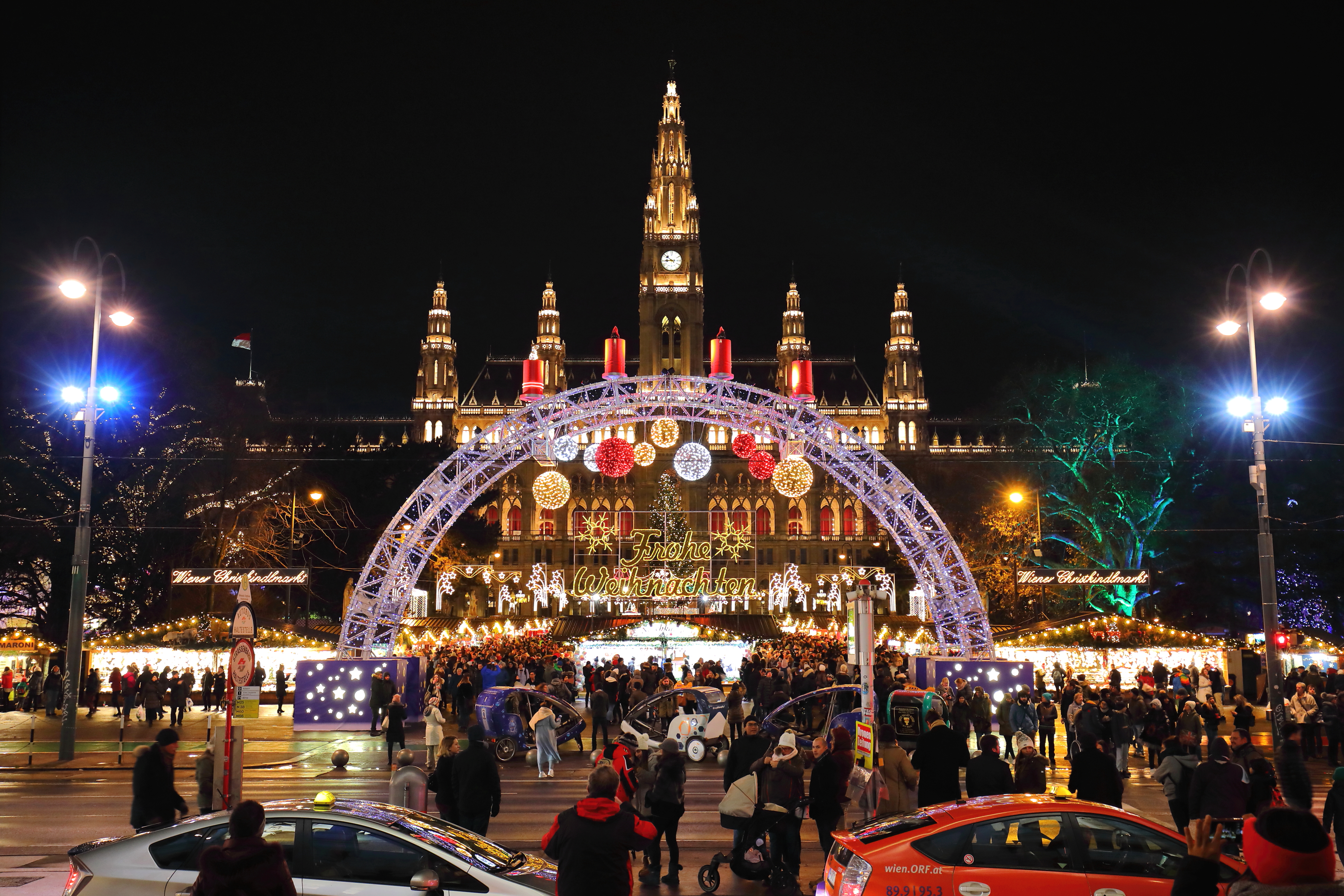 Der Wiener Christkindlmarkt am Rathausplatz im 1. Wiener Gemeindebezirk Innere Stadt. Insgesamt gab es im Jahr 2017 in Wien 21 Weihnachts/Advent/Christkindlmärkte mit 995 Ständen. Der größte davon war mit 155 Ständen, davon 18 Gastronomiestände, der Christkindlmarkt am Rathausplatz.